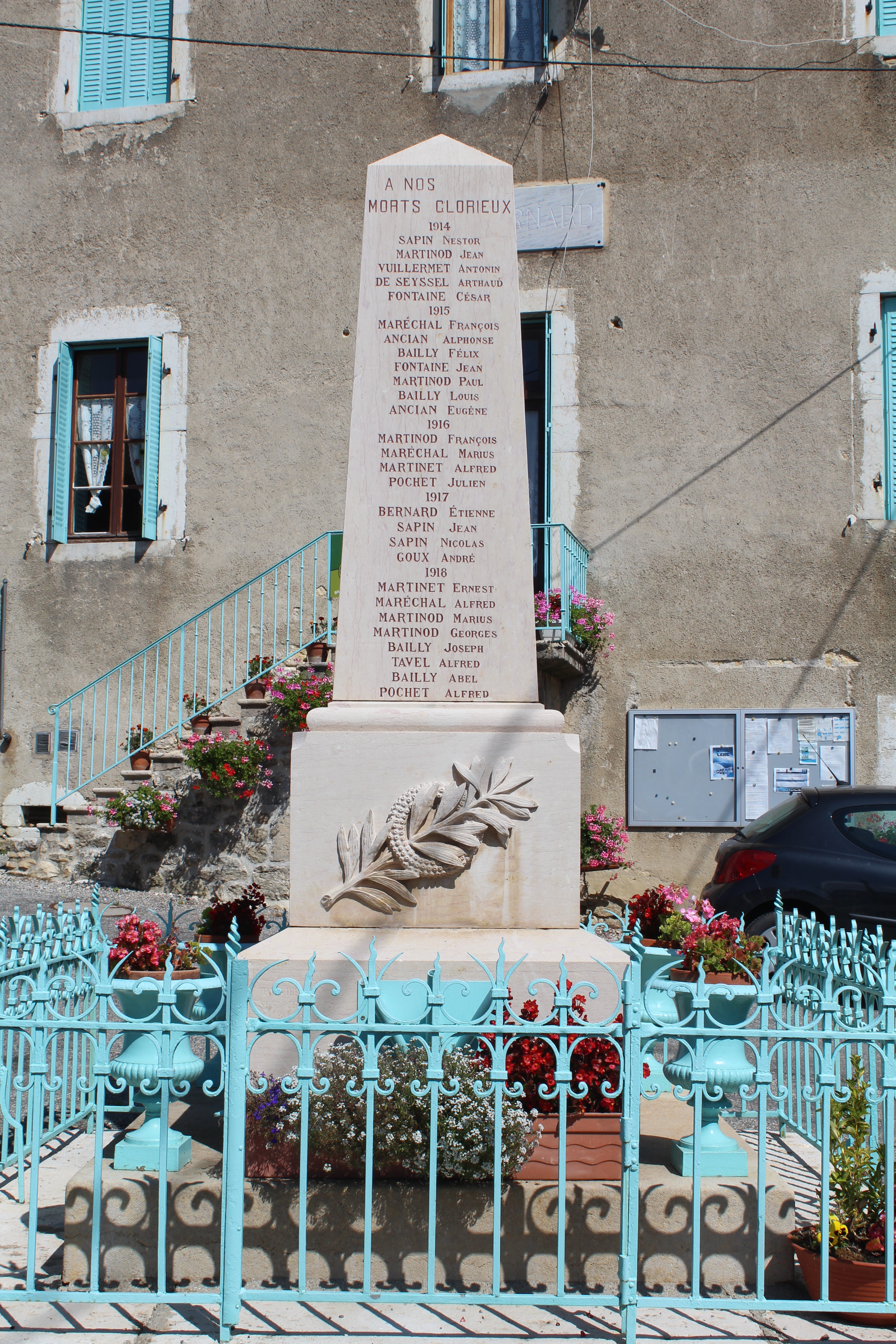 Monument aux morts de Songieu, Haut-Valromey.